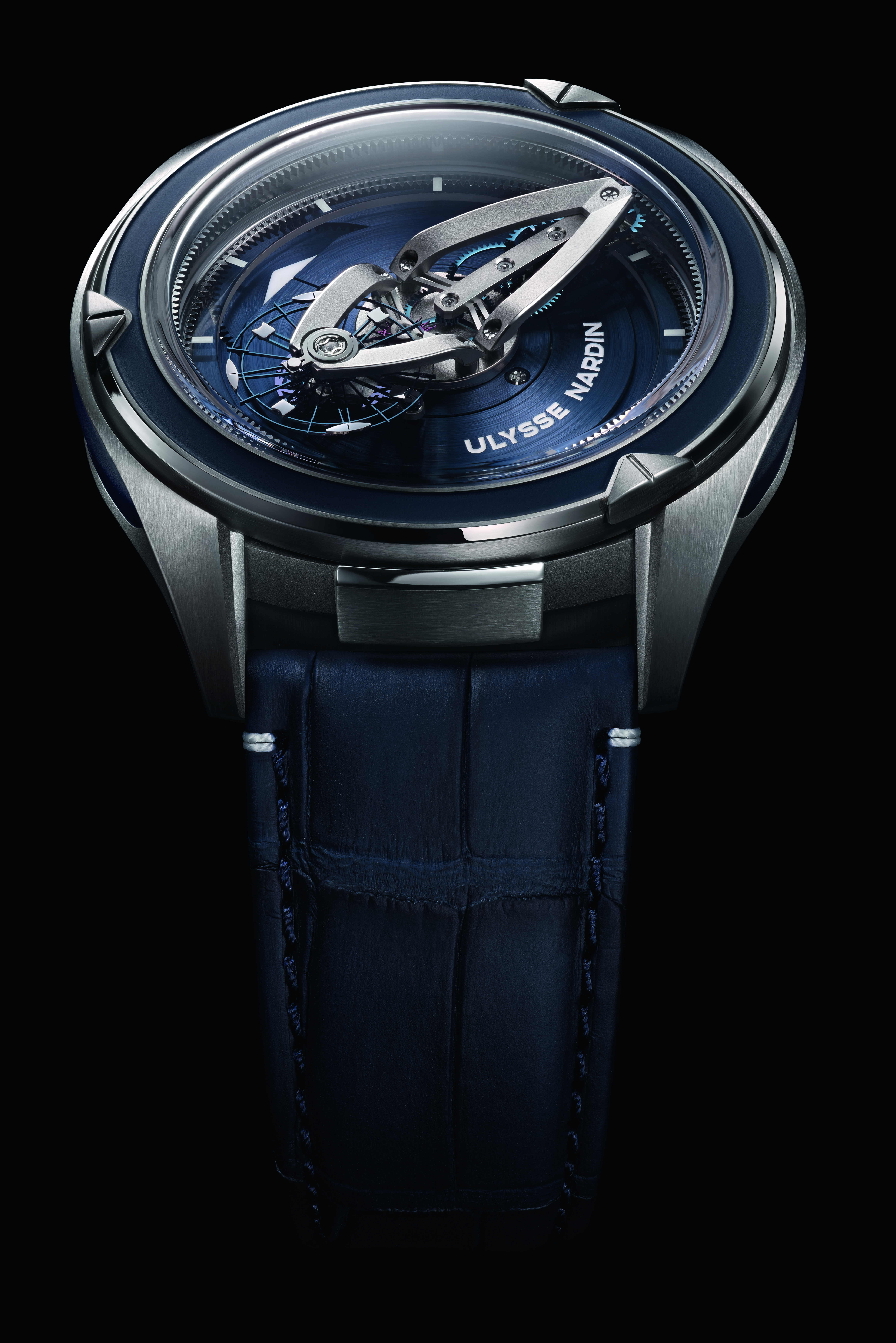 Introducing the first automatic watch in the Freak Collection, the Freak Vision: a Haute Horlogerie wonder in-corporating the revolutionary innovations unveiled in the Ulysse Nardin InnoVision 2 Concept Watch at SIHH 2017. Among the game-changers: a super-light silicium balance wheel with nickel mass elements and stabiliz-ing micro-blades and a new case design made even thinner by a box-domed crystal.